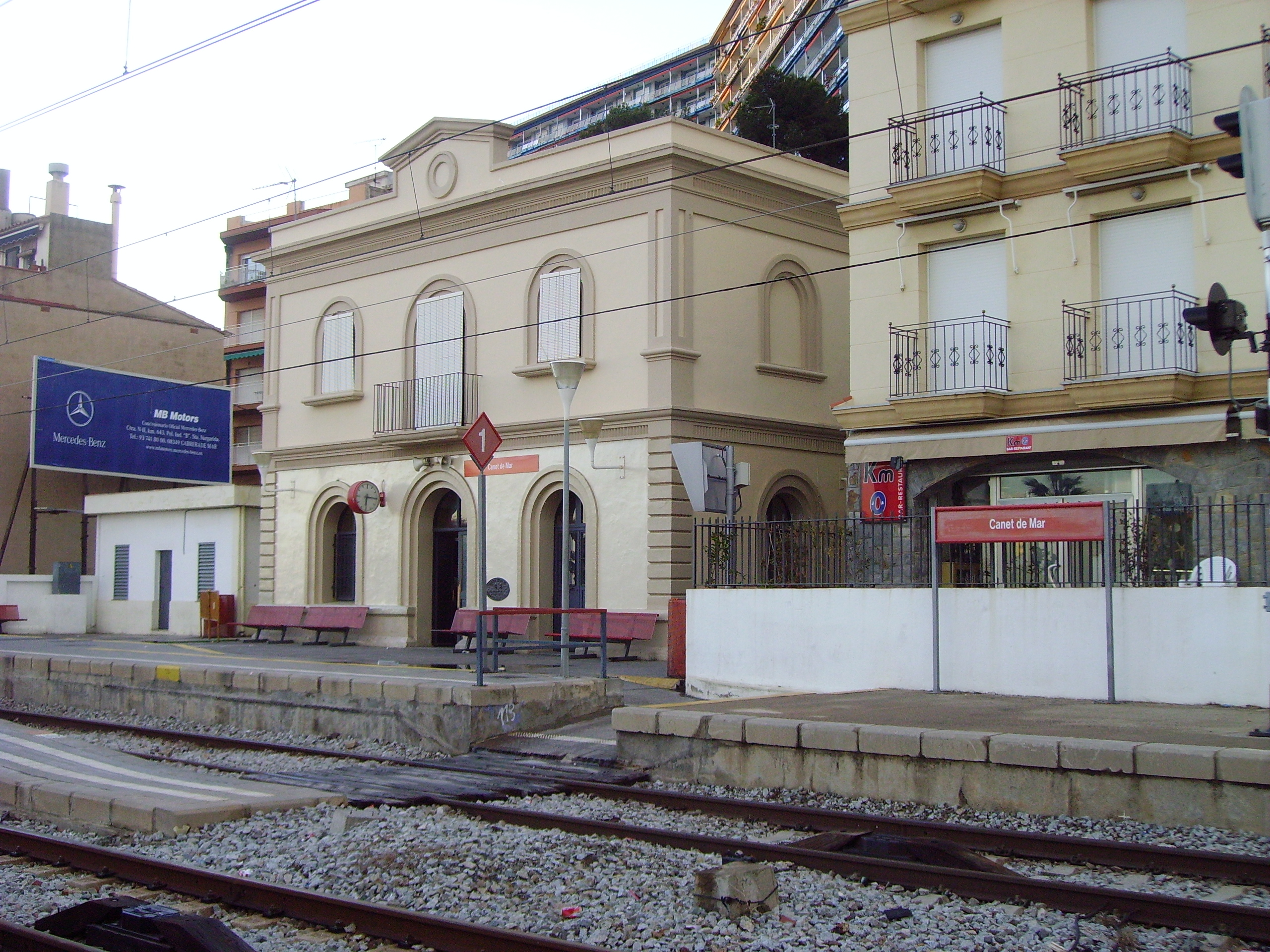 Estació de Canet de Mar, comarca del Maresme, (Catalunya)